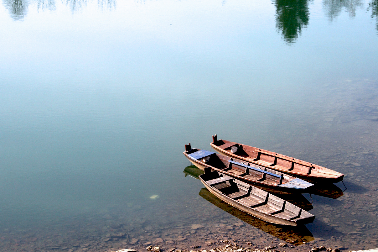 Šiklje u Sisku, Hrvatska